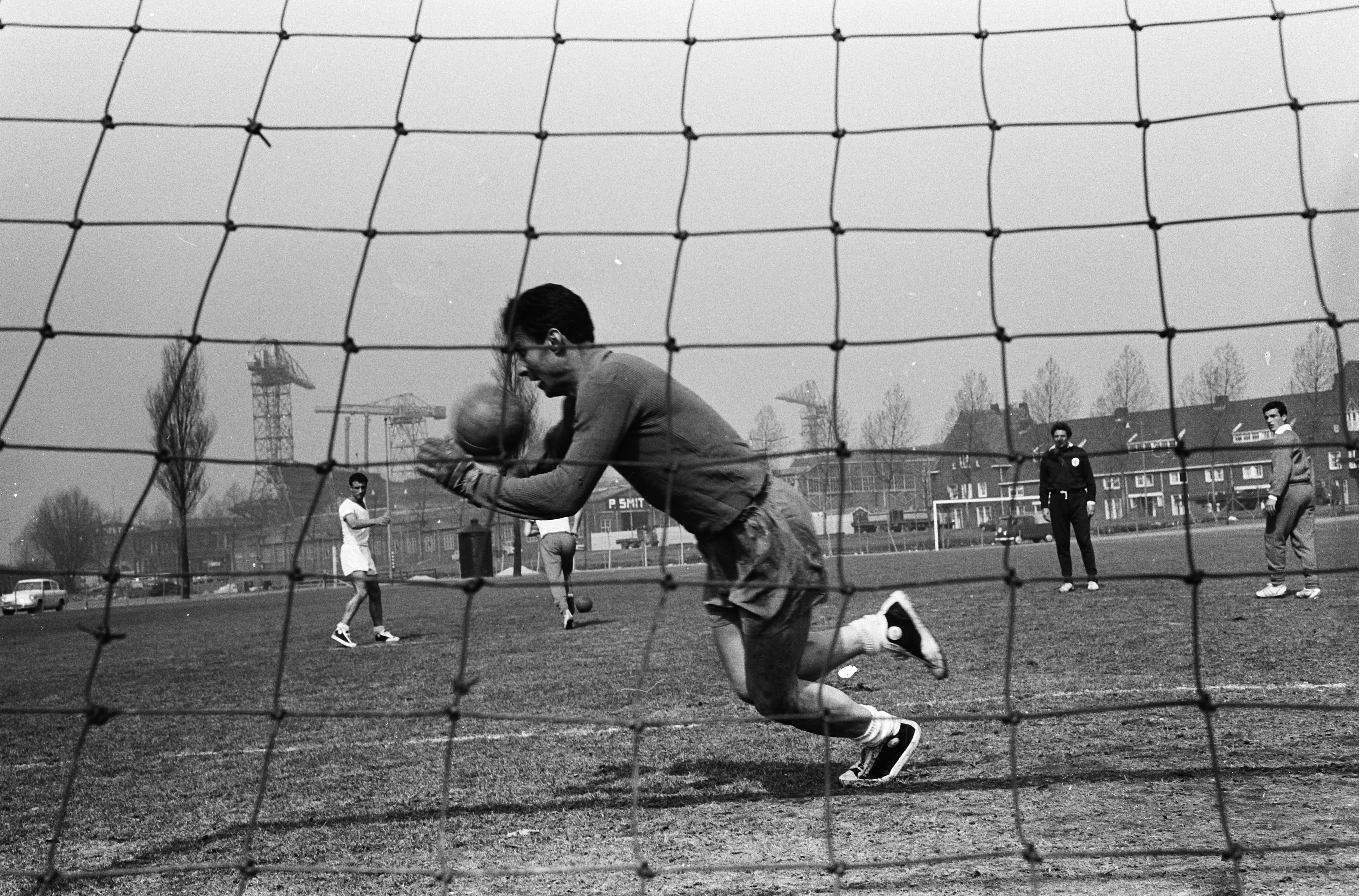 Collectie / Archief : Fotocollectie Anefo Reportage / Serie : [ onbekend ] Beschrijving : Benfica traint op bijvelden Feijenoord, keeper Pereira tijdens een oefenpartijtje in aktie Annotatie : De keeper draagt zo te zien gymschoenen Datum : 8 april 1963 Locatie : Rotterdam Trefwoorden : sport, voetbal Instellingsnaam : Benfica, Feyenoord Fotograaf : Pot, Harry / Anefo Auteursrechthebbende : Nationaal Archief Materiaalsoort : Negatief (zwart/wit) Nummer archiefinventaris : bekijk toegang 2.24.01.05 Bestanddeelnummer : 915-0214